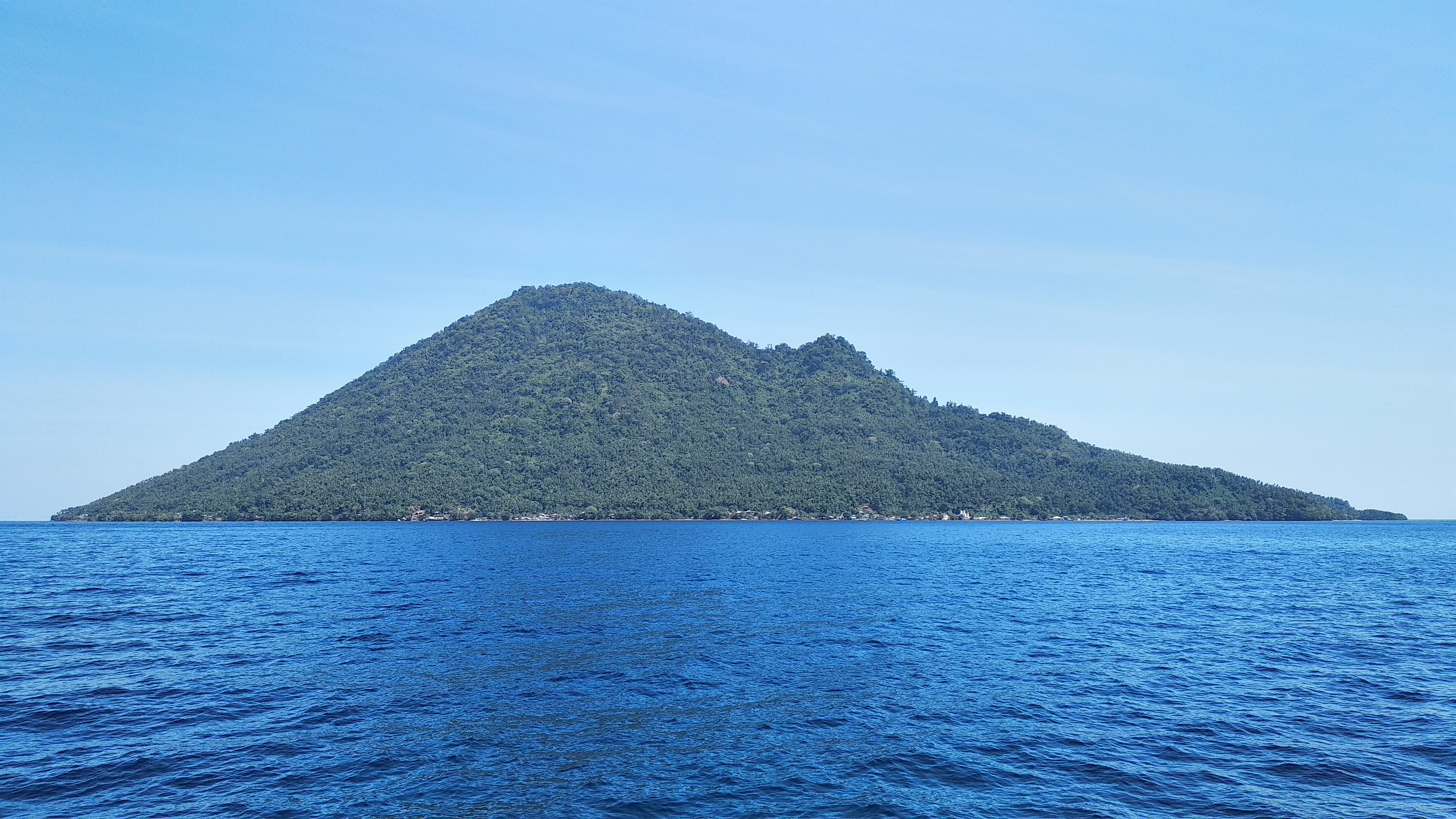 Bahasa Hulontalo: Pulo Manado Tua, Sulawesi Utara, Indonesia.